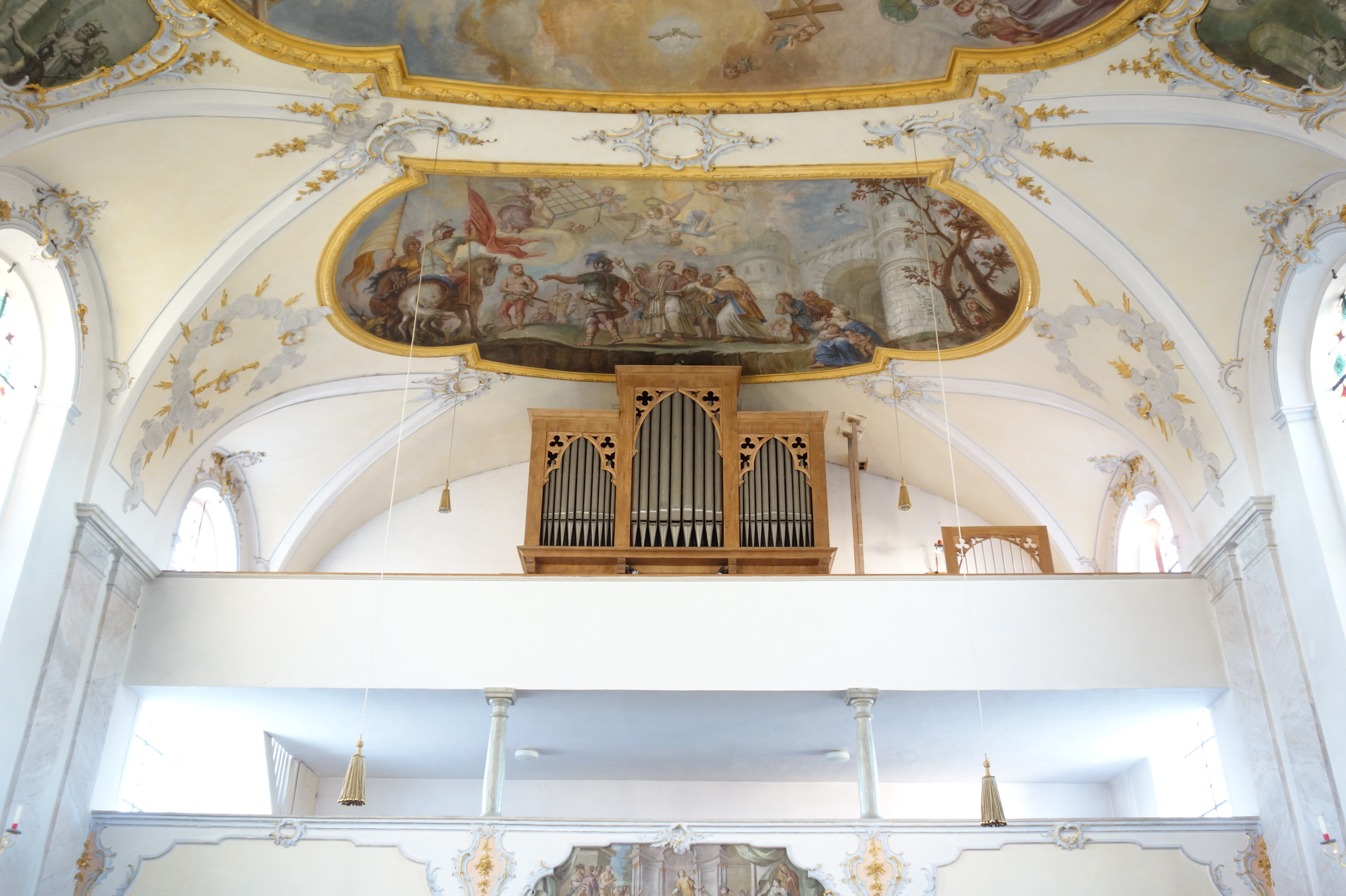 Die Orgel von St. Laurentius in Pähl (1846, Johann Georg Beer (Erling), II/20